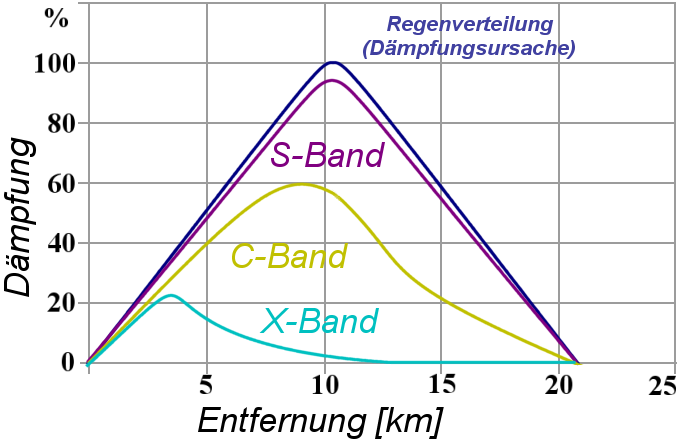 Die oberste (blaue) Kurve zeigt als Ursache der Dämpfung die geometrische Ausdehnung eines Gewitters mit 20 km im Durchmesser mit einer zum Zentrum hin zunehmenden Niederschlagsmenge bis 100 mm/hr. Die nächste Kurve (in Pink) zeigt die im Pegel angeglichene Amplitude der Radarechos von einem Radargerät im S-Band. Die nächsten zwei Kurven zeigen das Gleiche von einem Radargerät im C-Band (Gelb) und einem im X-Band (Hellblau).